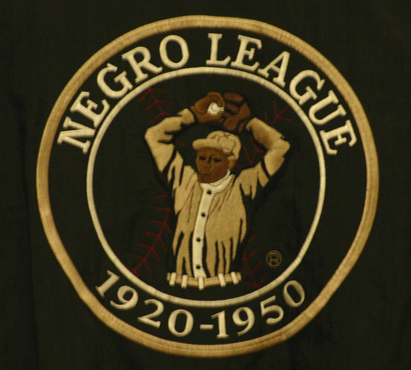 Negro League emblem [1]